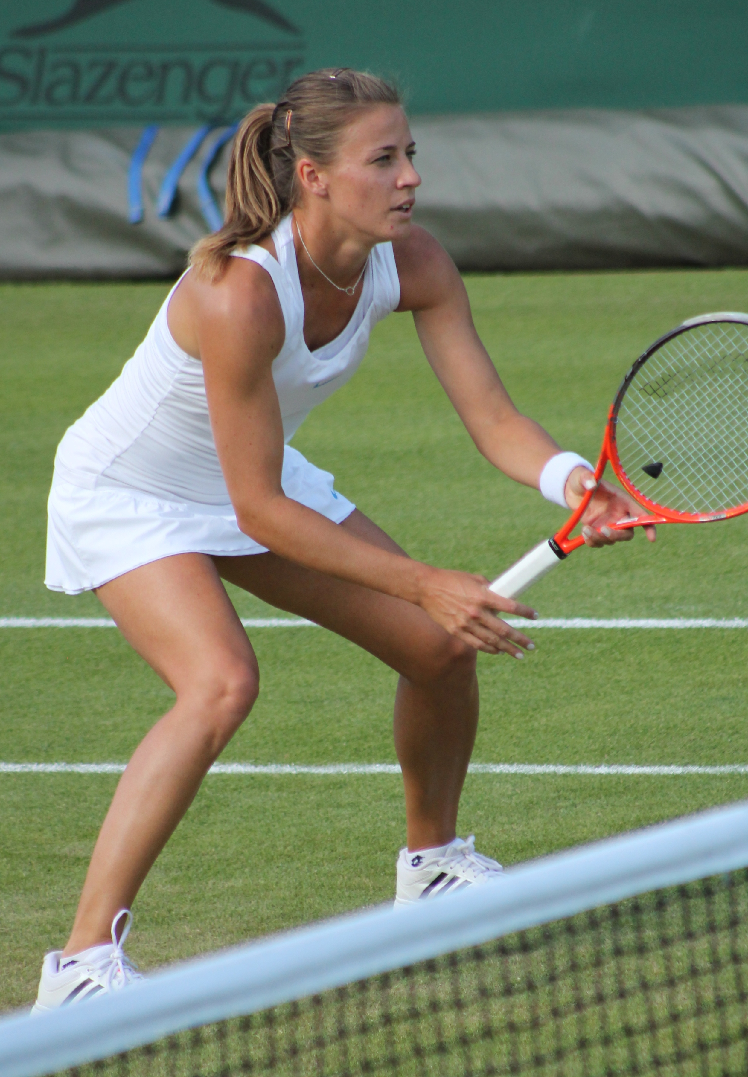 Alicja Rosolska at 2013 Wimbledon